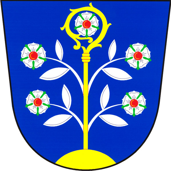 Znak obce Panenská Rozsíčka